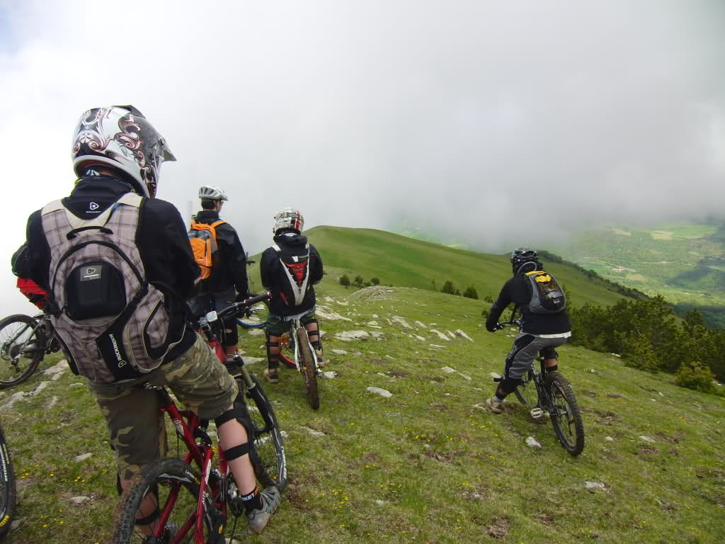 Salida de enduro al Taga